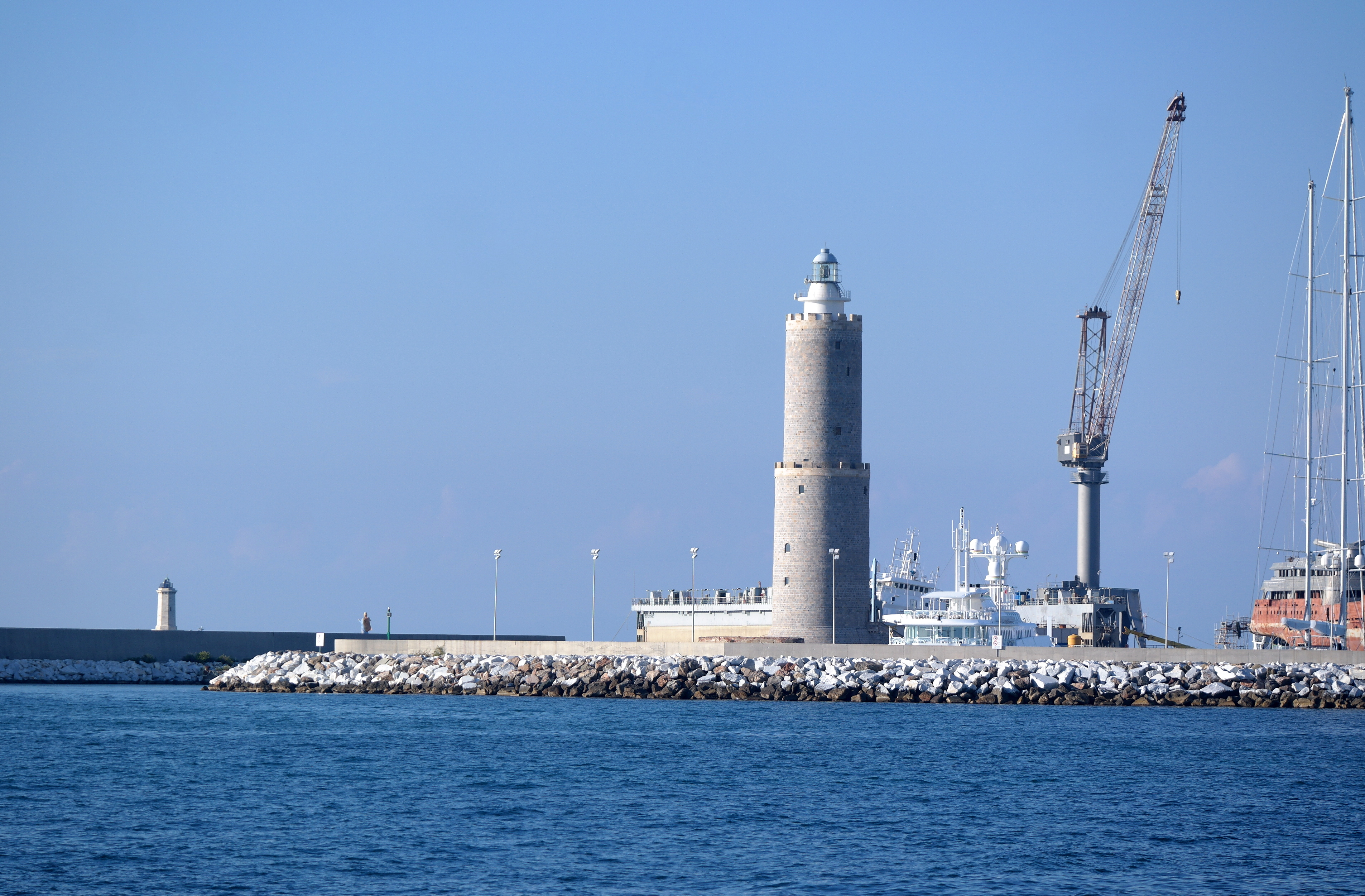 Fanale di Livorno visto dalla Terrazza Mascagni